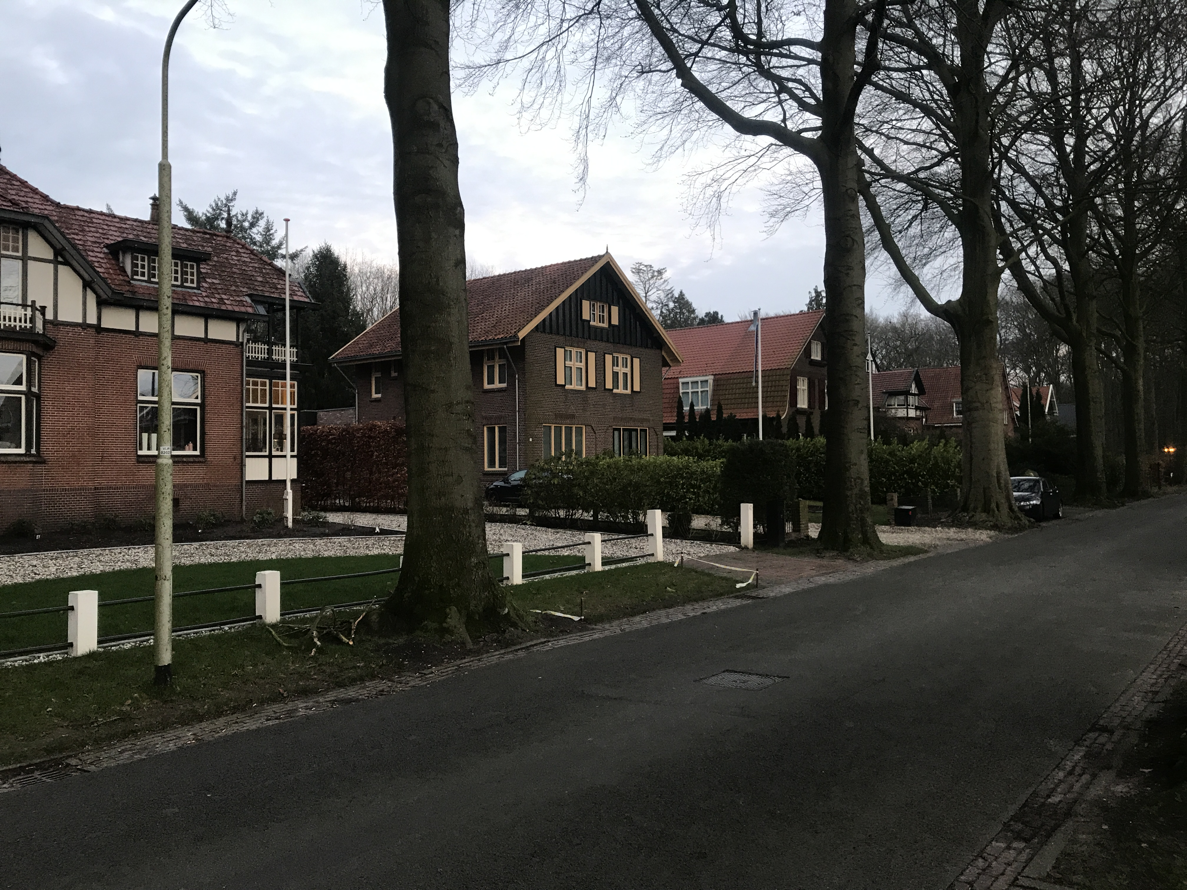 Schotslaan Ter Apel